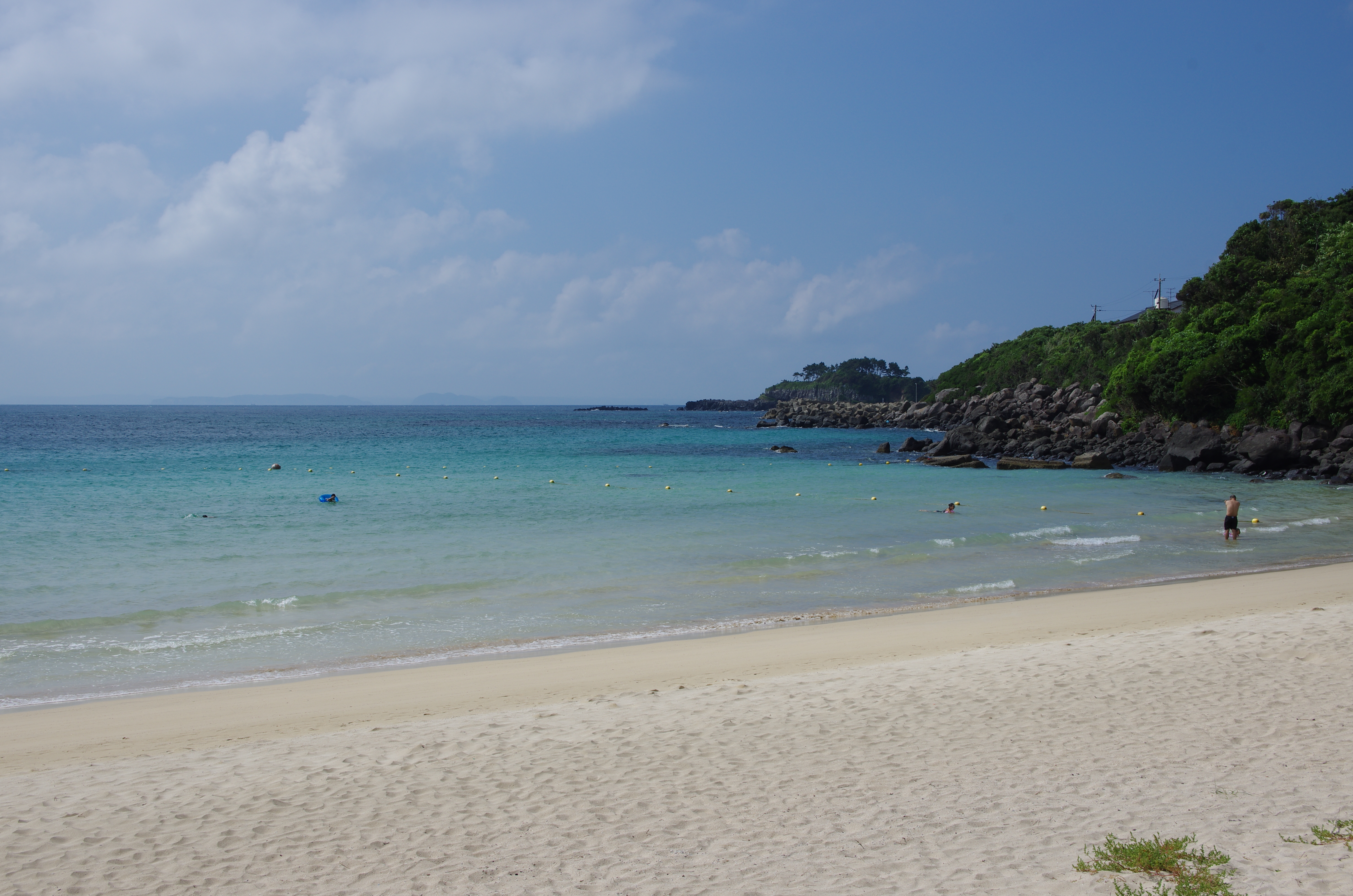 日本の渚百選